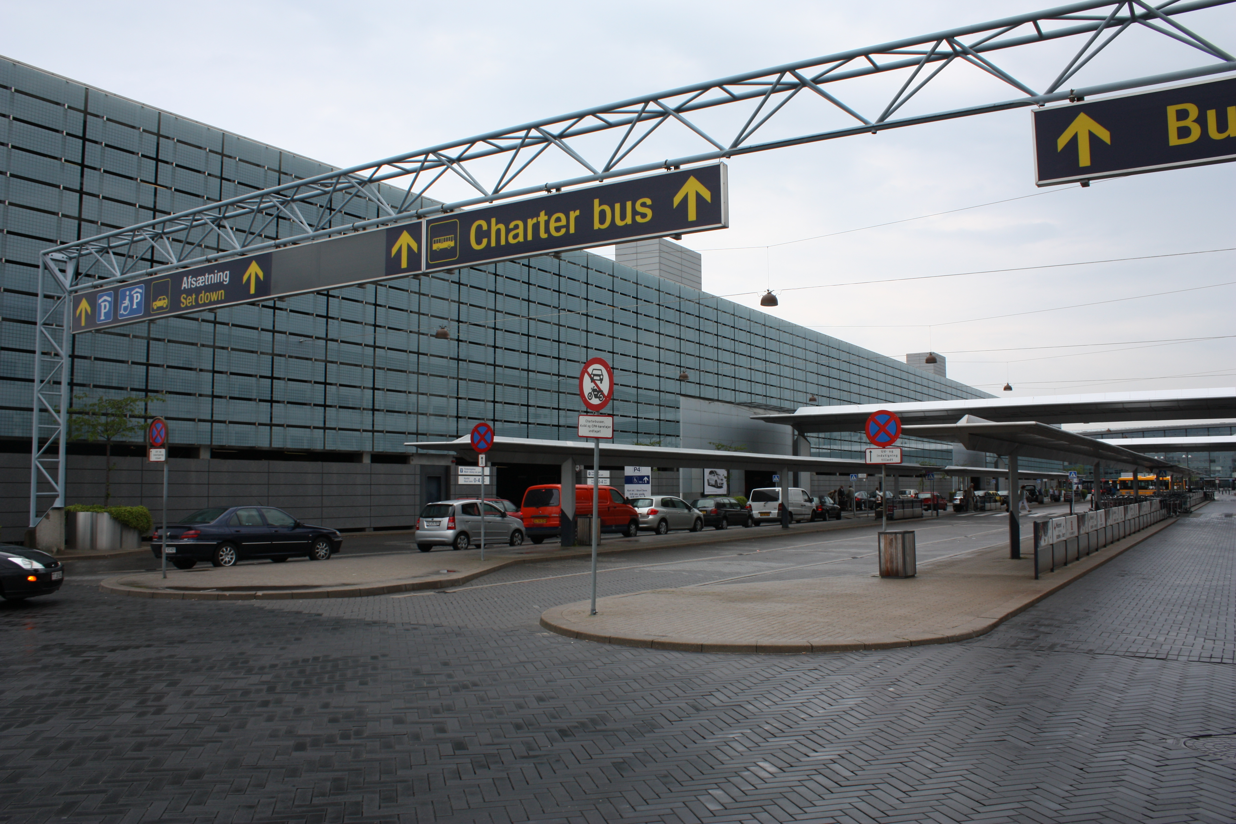 Flughafen Kopenhagen 2009